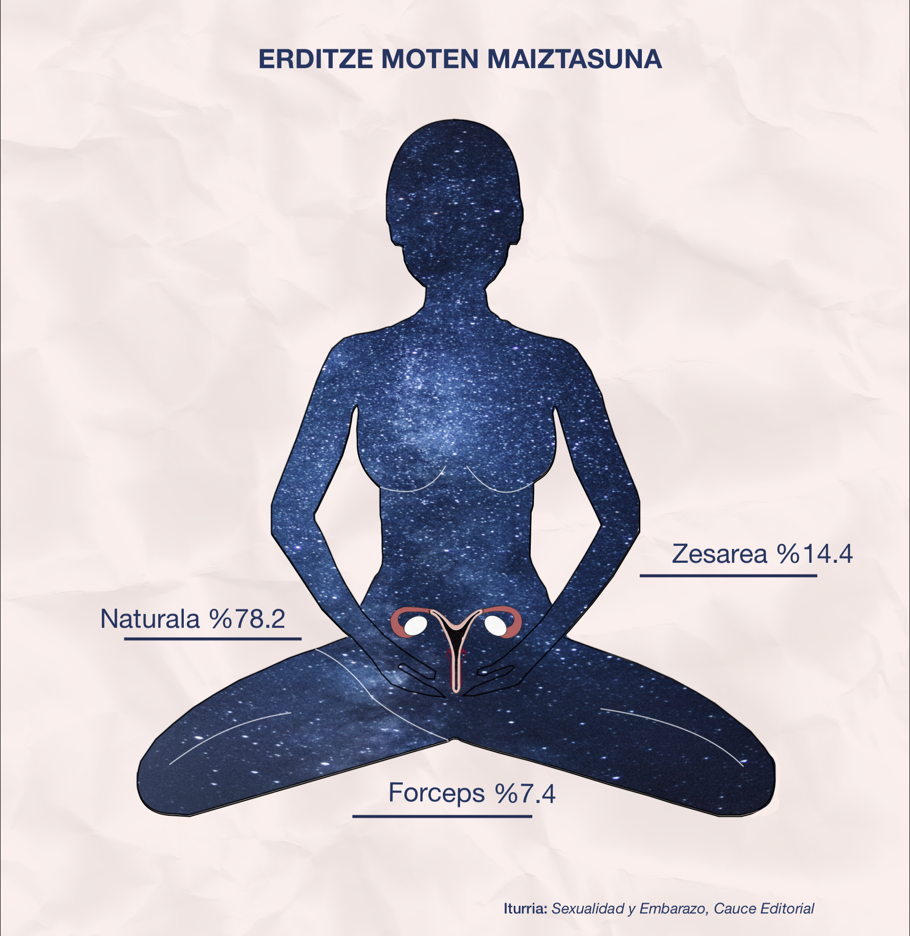 Erditzeko modu ezberdinak eta horien arteko portzientaiak.